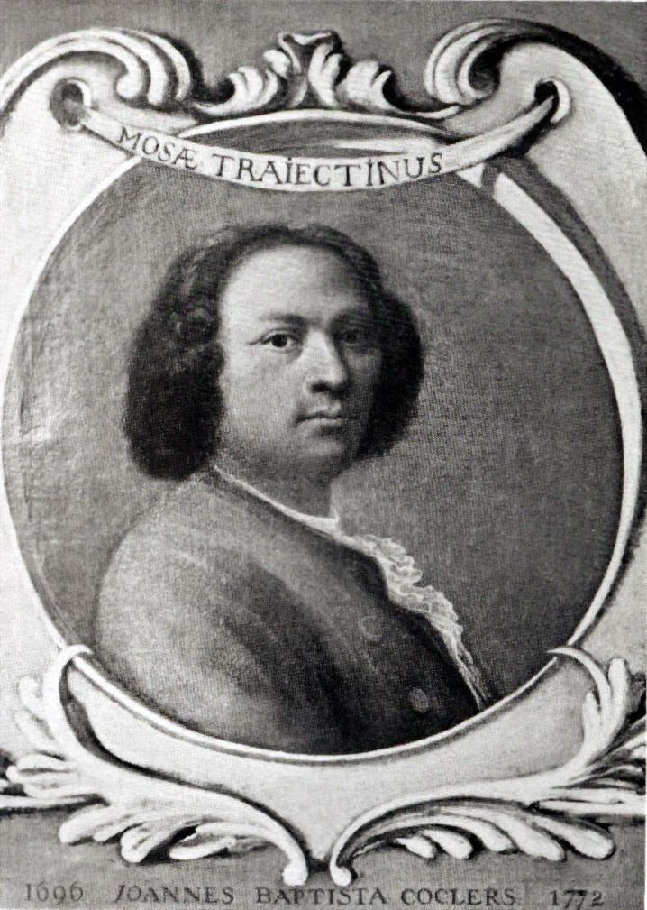 Self-portrait